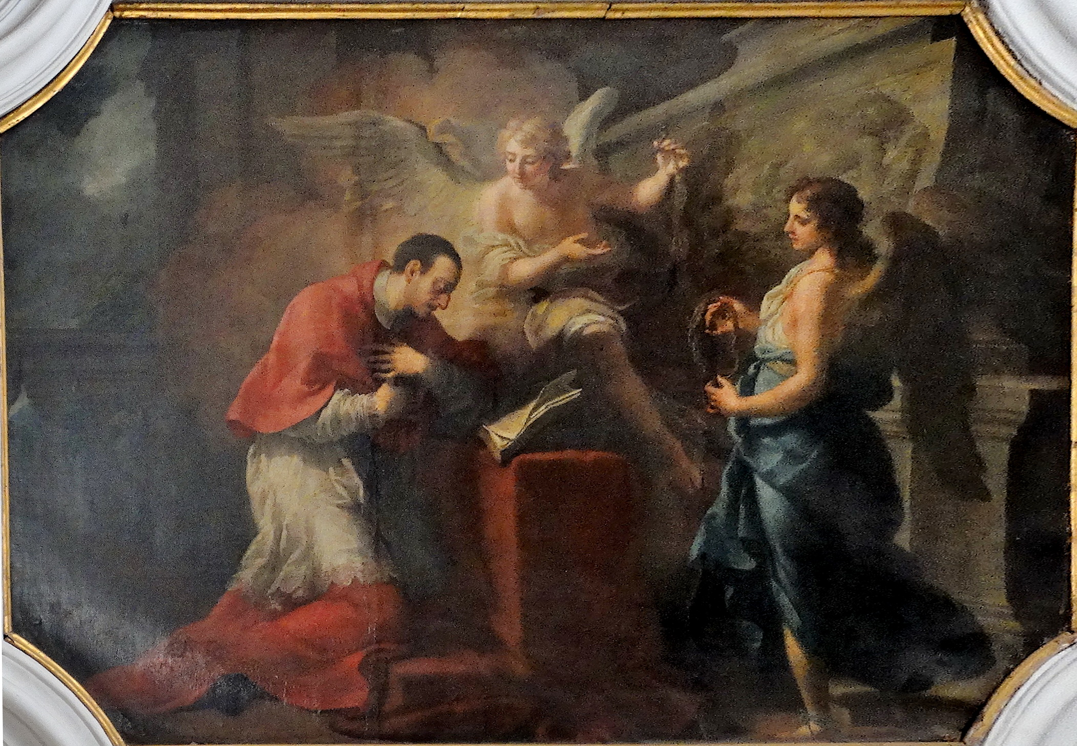 "Carlo Borromeo in meditazione" di Ludovico Stern XVIII sec., Santa Prassede (Roma), Cappella di San Carlo Borromeo